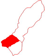 Ubicación de la parroquia Rafael Urdaneta, municipio Valmore Rodríguez, estado Zulia, Venezuela